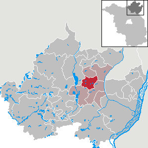 Uckerfelde in Brandenburg (Country) - District Uckermark